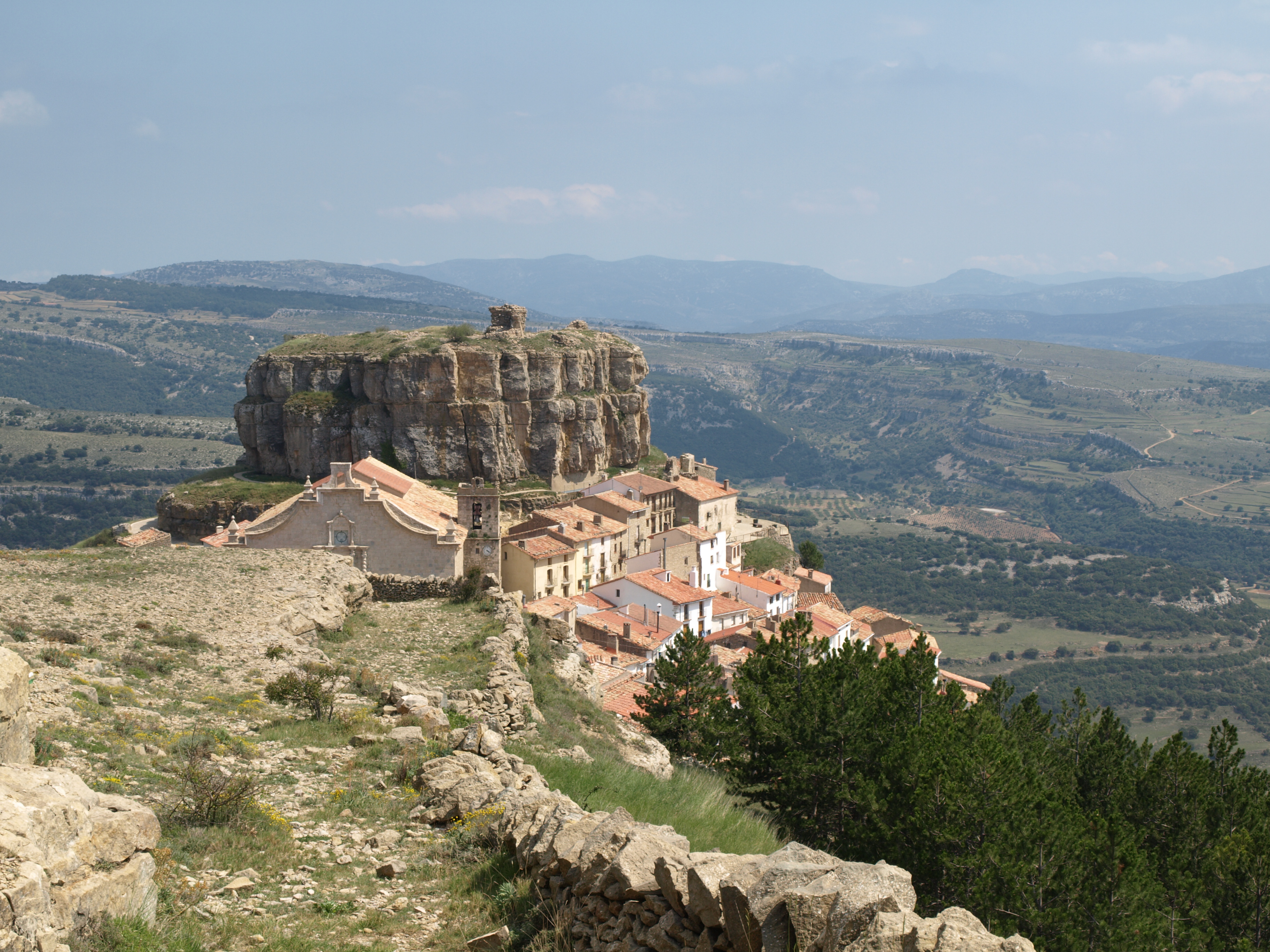 Ares del Maestre desde la Muela de Ares This is a photography of a Site of Community Importance in Spain with the ID: ES5223002. Natura2000 entry, EEA entry